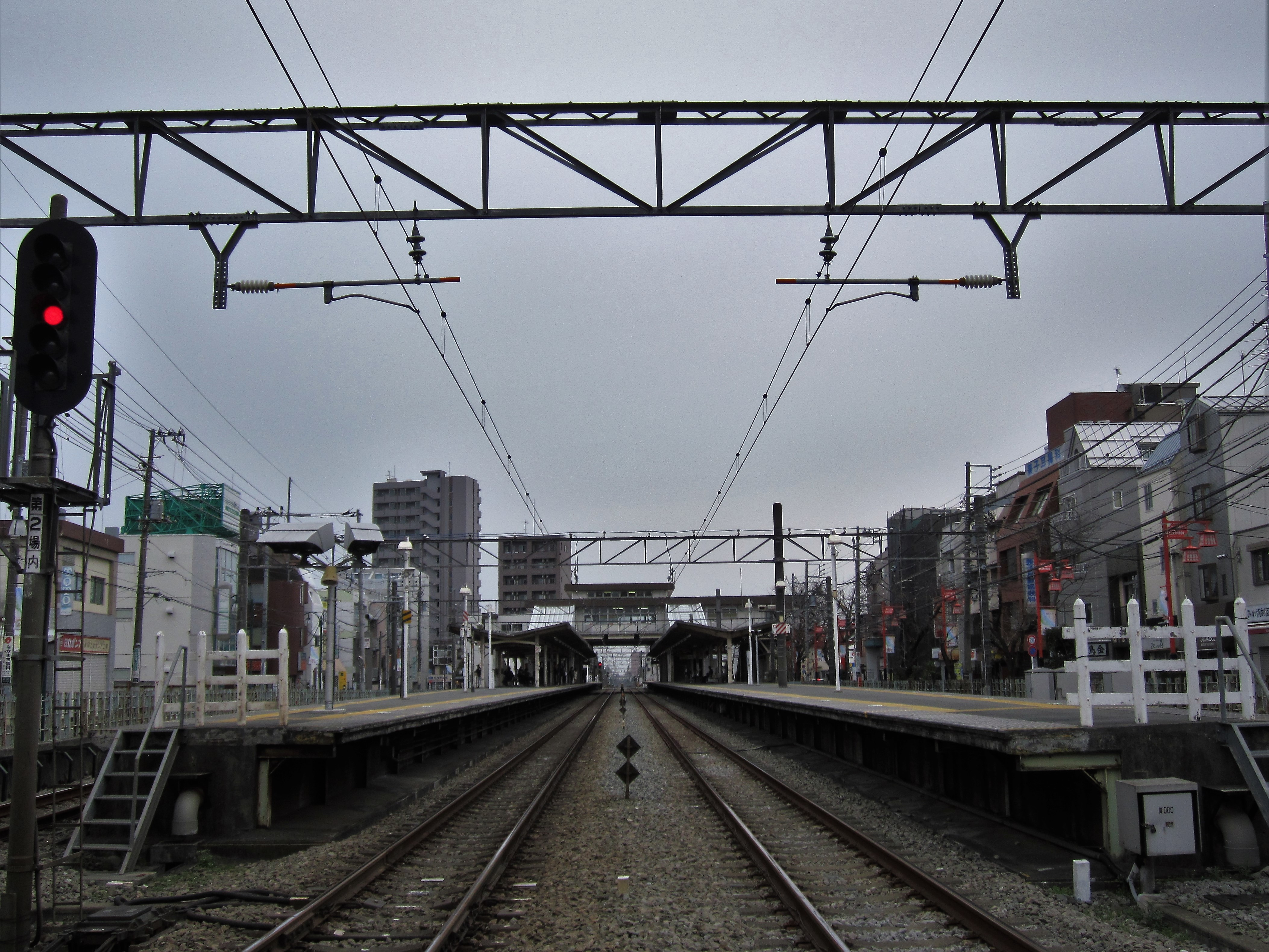 東伏見駅構内 Canon PowerShot A2200